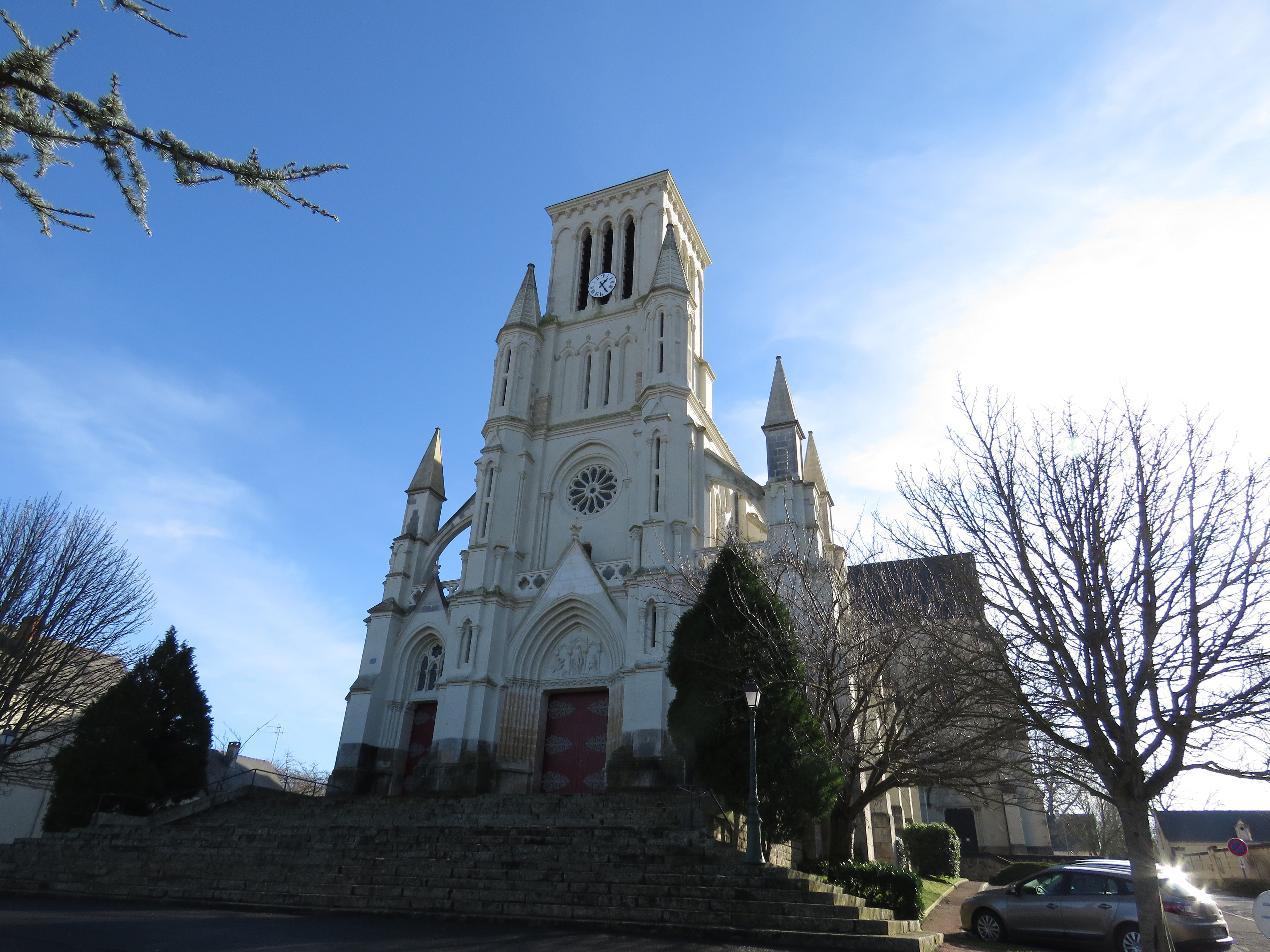 Église de Longué